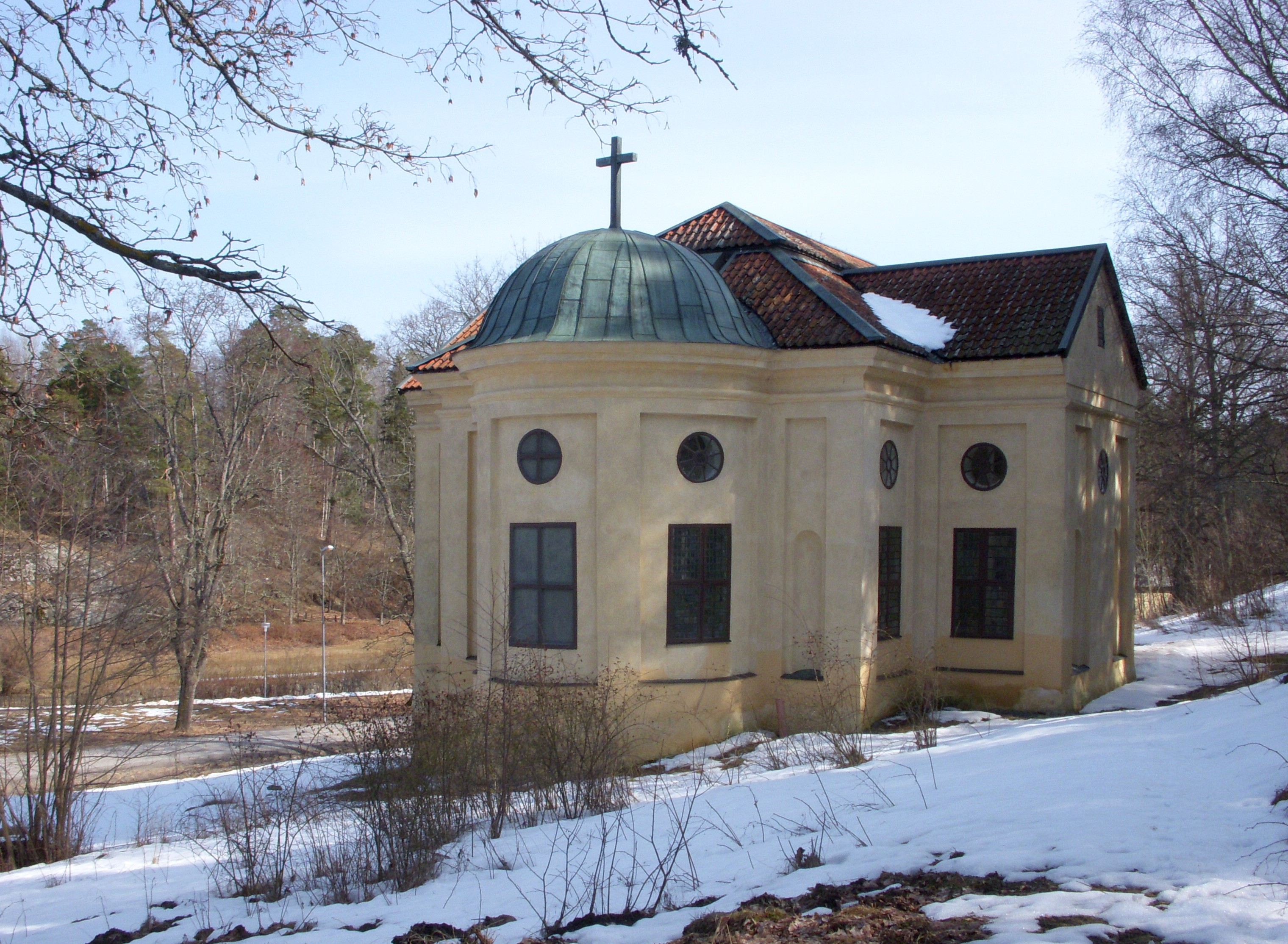 Vällinge kapell i Salem kommun